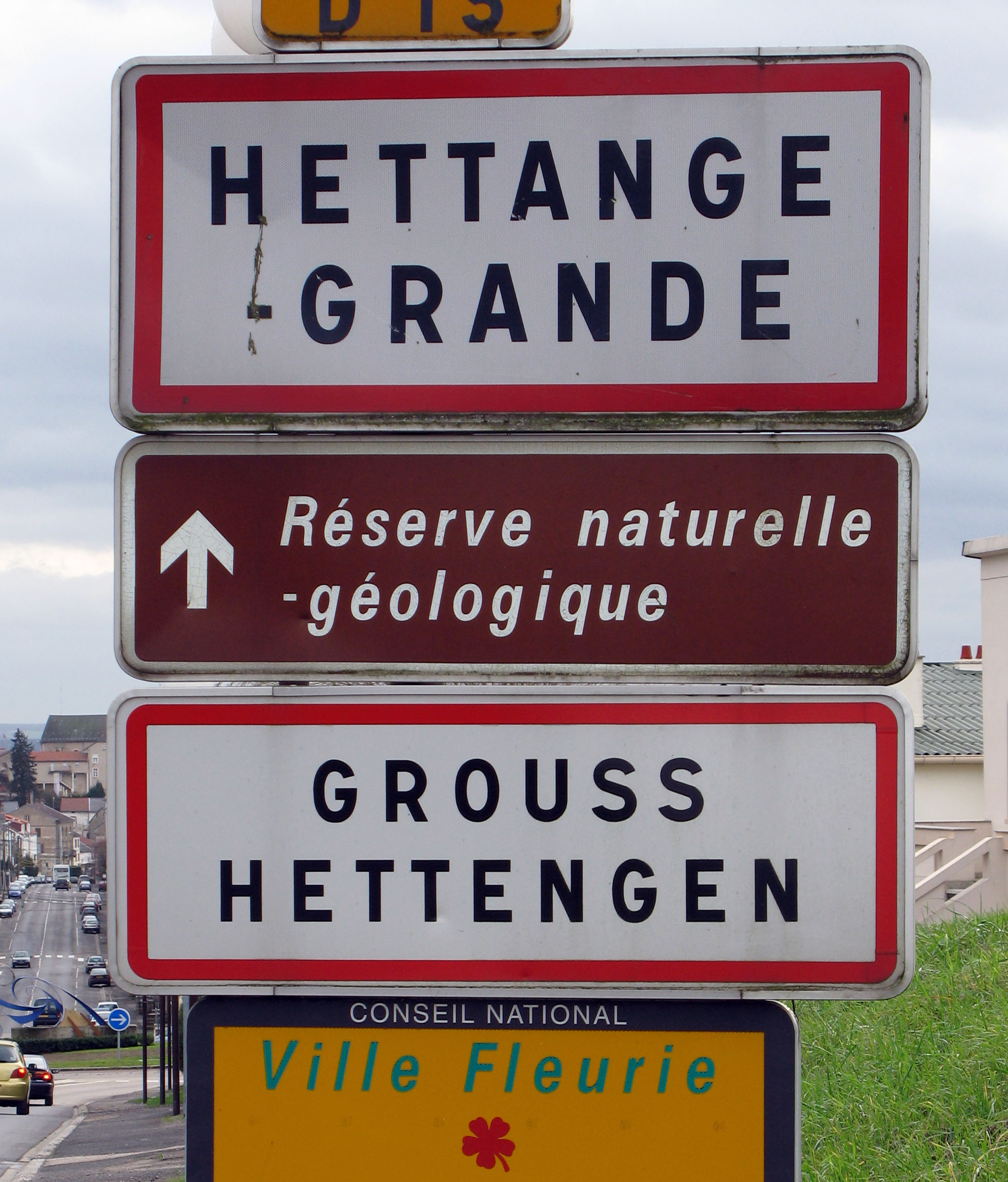 Grouss-Hetteng